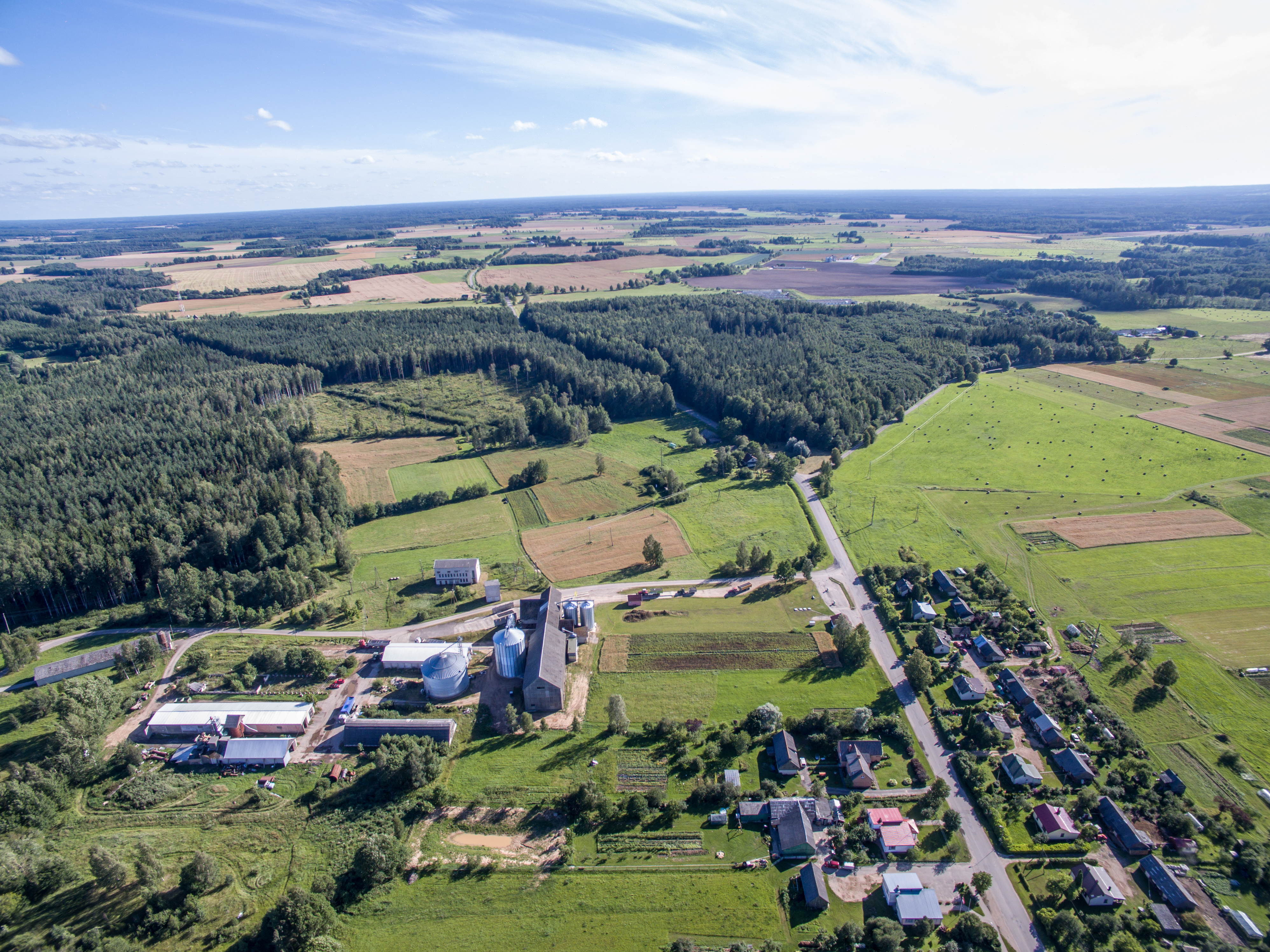 Vārme, Vārmes pagasts, LV-3333, Latvia